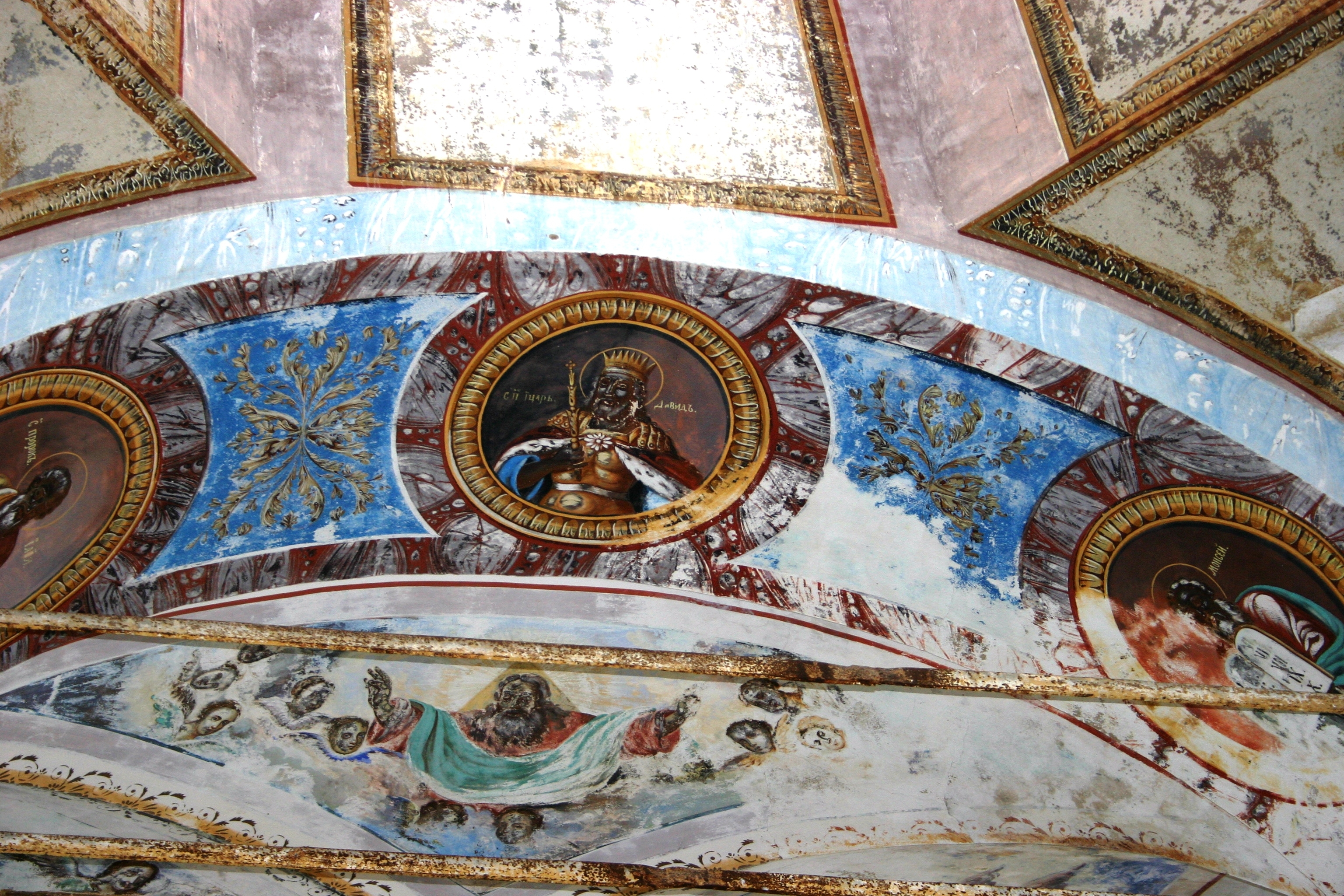 Konevitsan luostarin yläkirkon holvien maalauksia